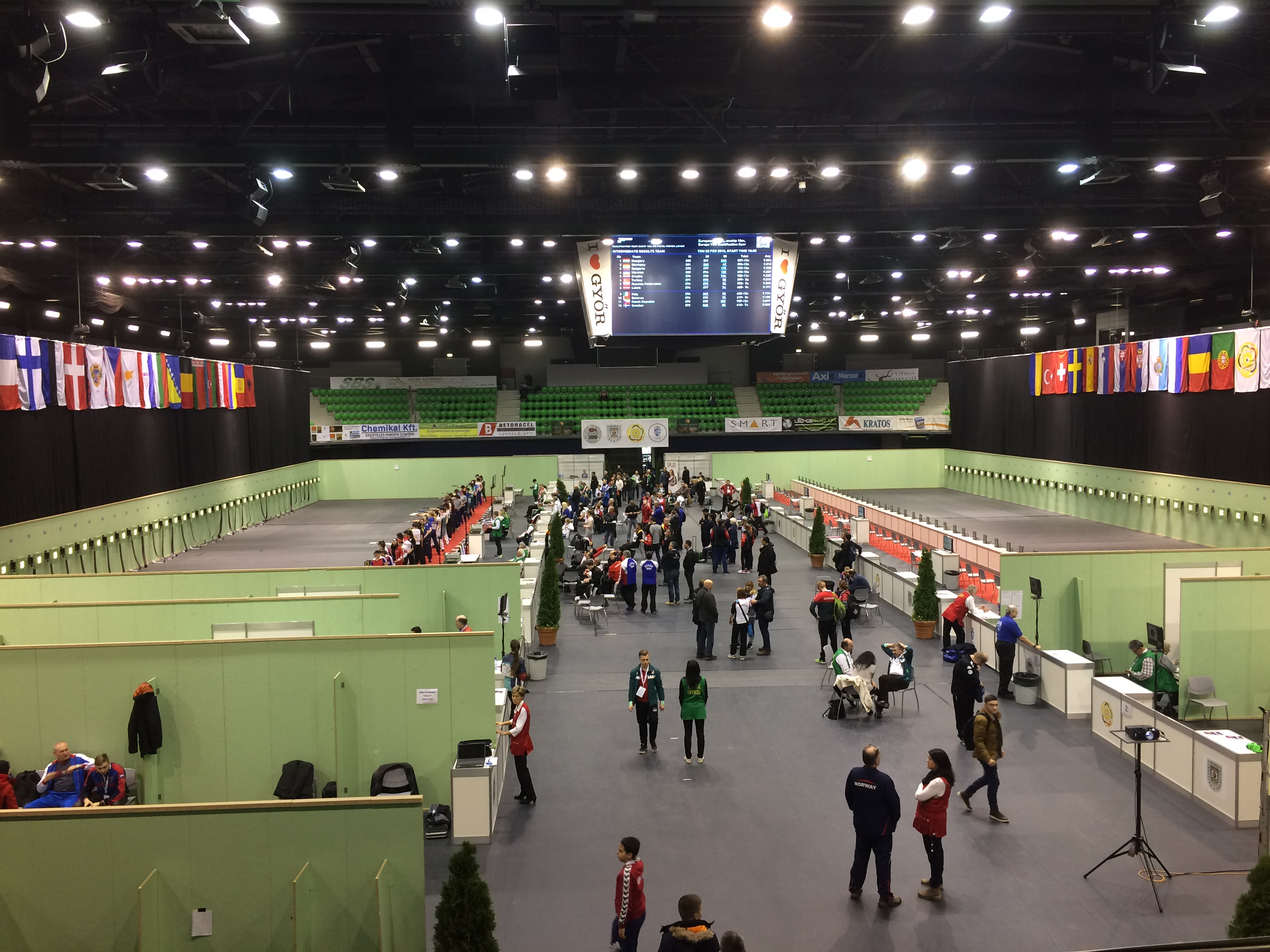 2018 10m European Shooting Championships - Audi Arena, Gyor, Hungary